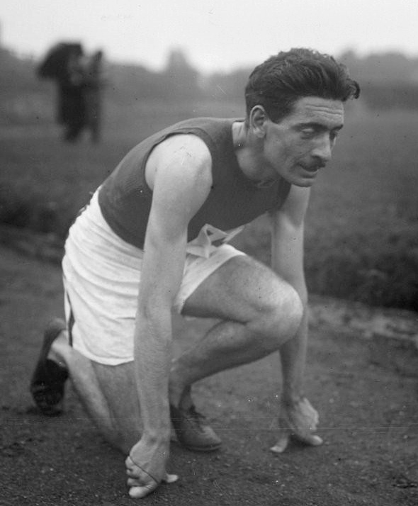 [Maurice] Delvart [au départ du 400 m, stade de Colombes le 28 septembre 1919]